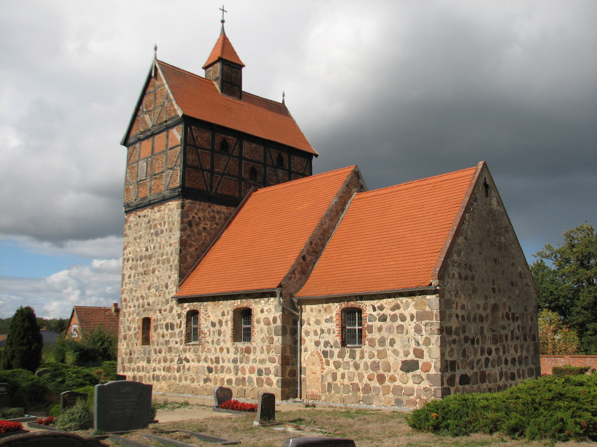 Die Kirche Genzien wurde aus Feldsteinen wohl im 13. Jahrhundert erbaut, das Fachwerk-Glockengeschoss entstand im 17. Jahrhundert.